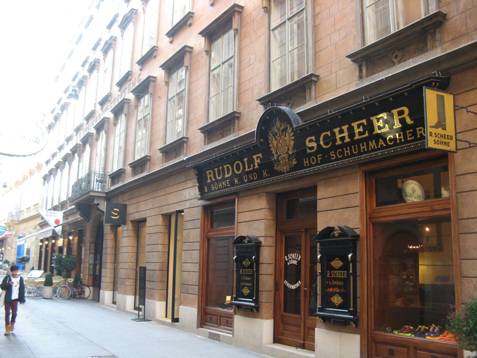 Haus (1845) von Josef Kastan, Bräunerstraße 4-6, Wien-Innere Stadt